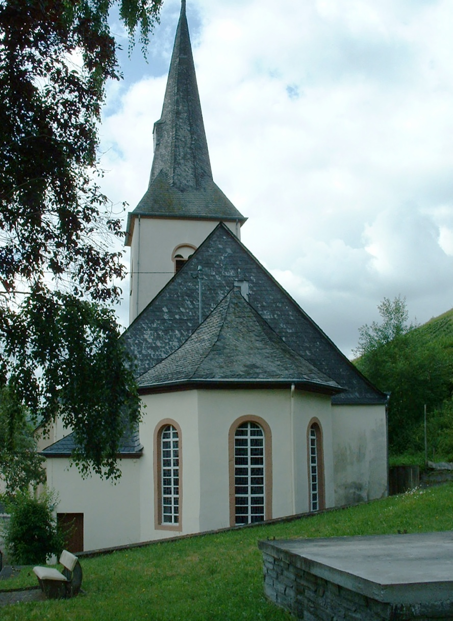 Evangelische Kirche Burgen (Hunsrück), Chor von aussen